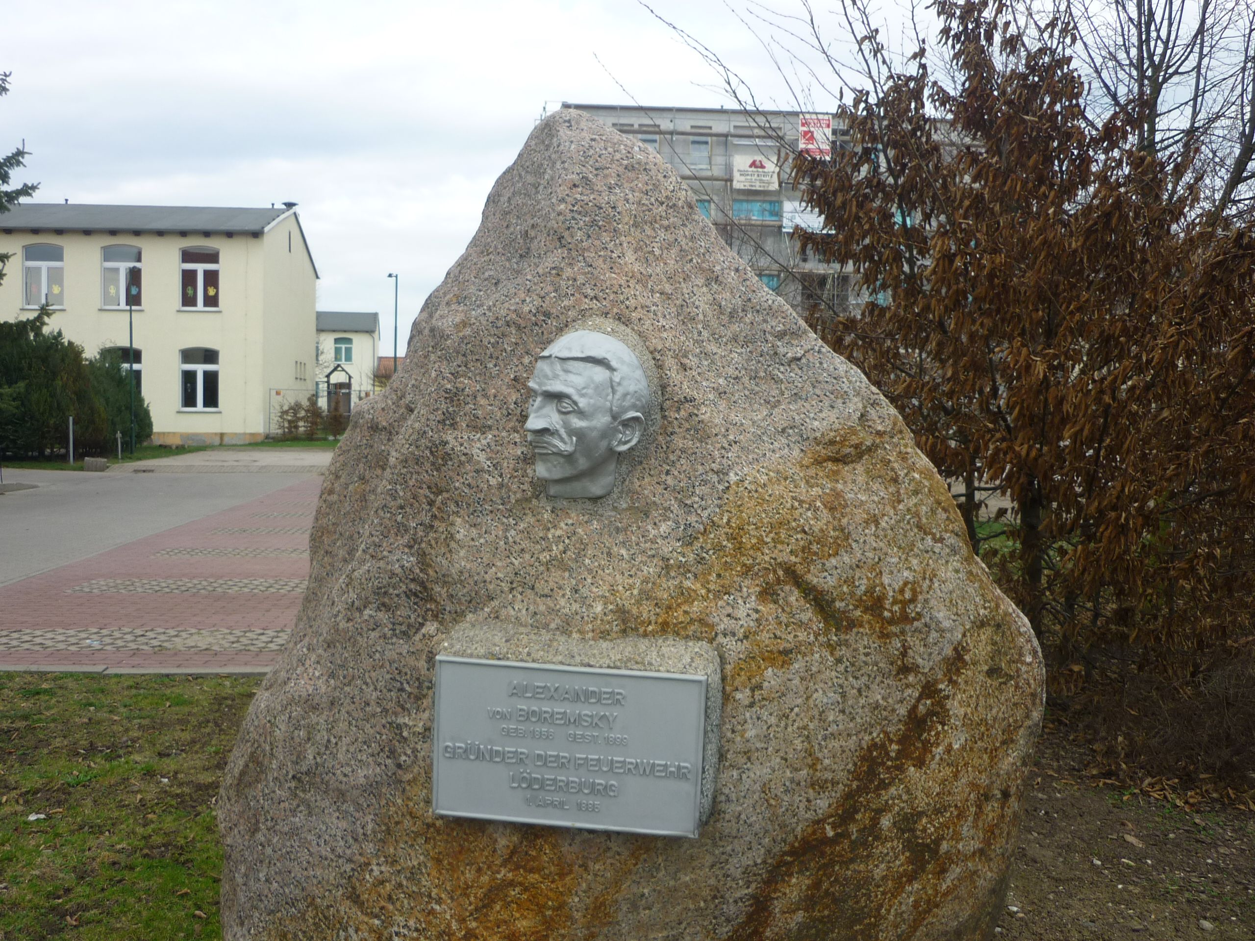 Gedenkstein für Alexander von Boremsky (1856-1899), dem Gründer der Freiwilligen Feuerwehr Löderburg 1885